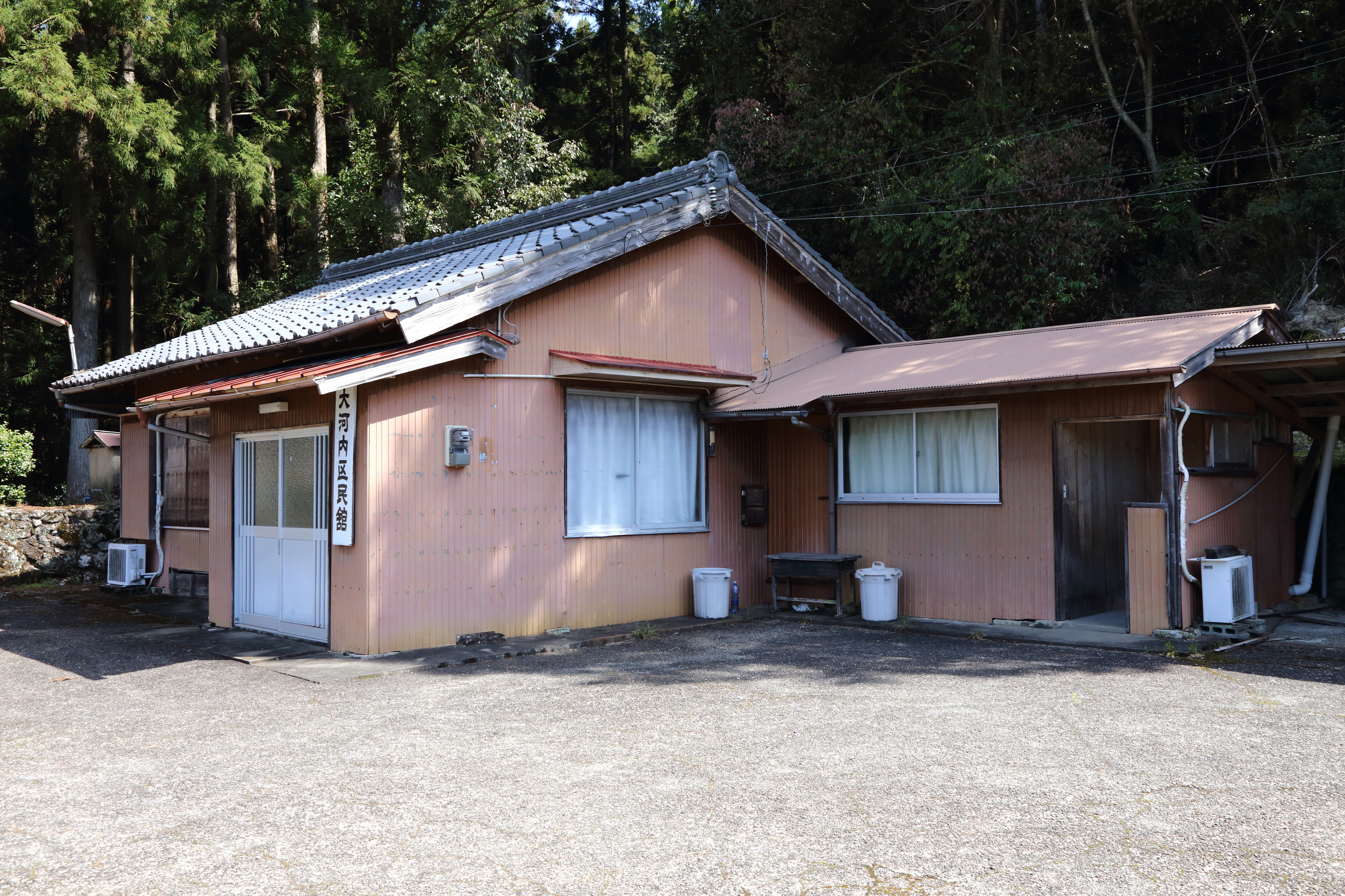 大河内区民館 三重県熊野市紀和町大河内 紀和町大河内